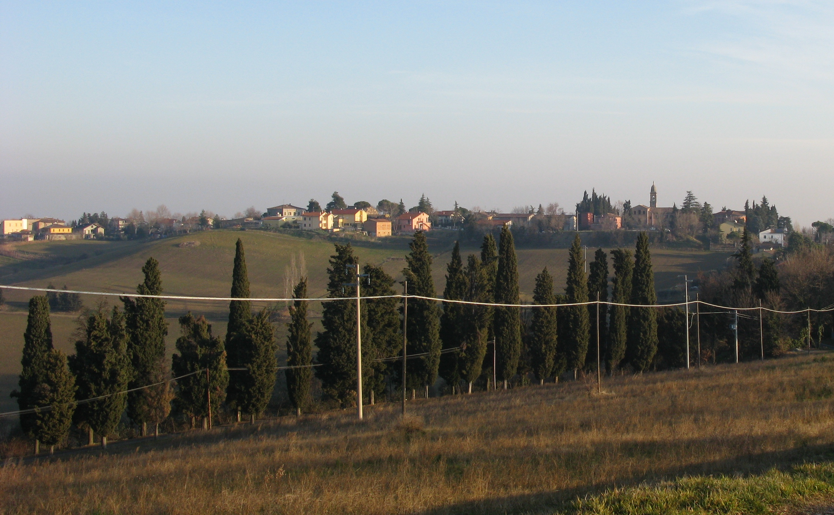 Panorama di Poggio Berni.